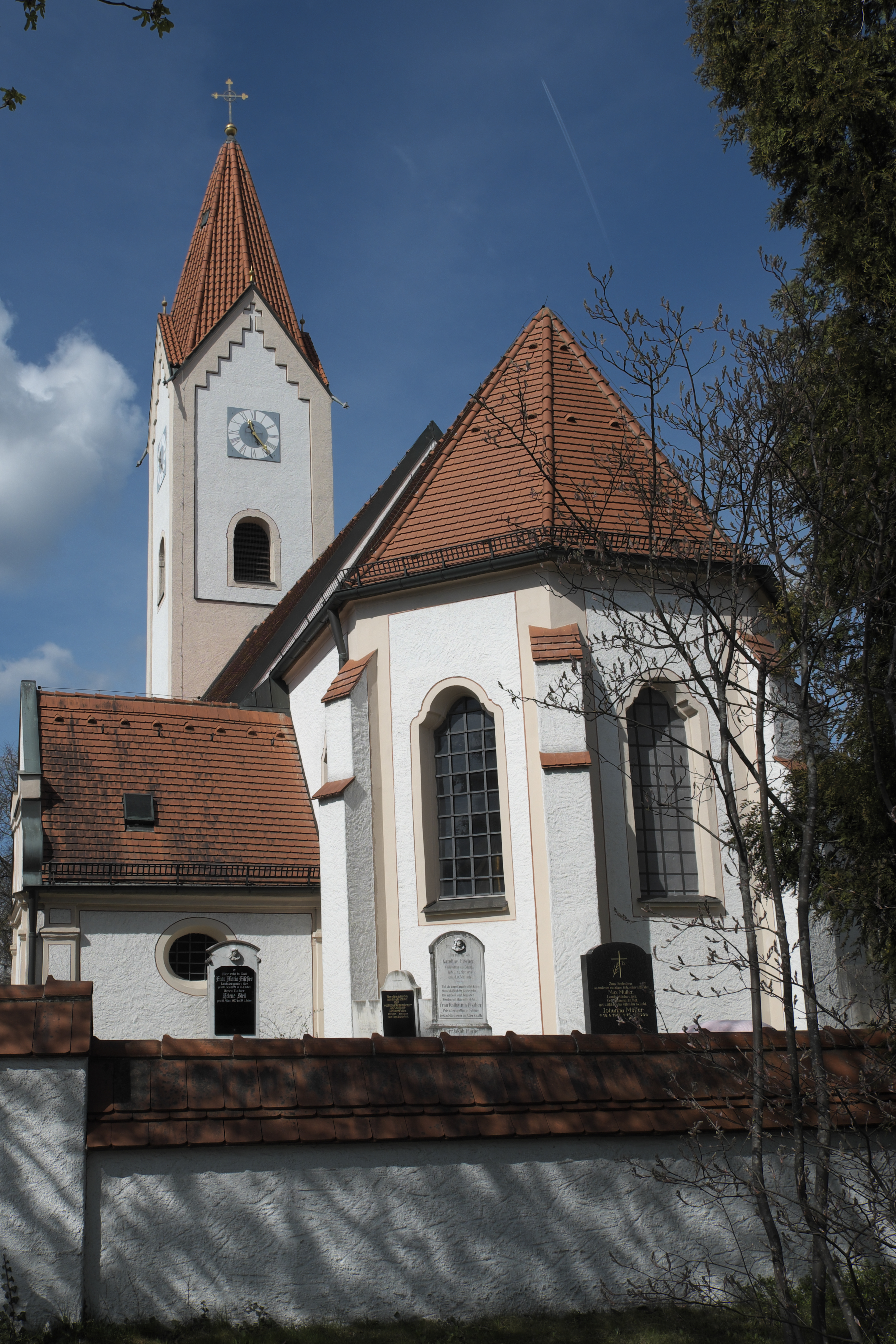 Alte katholische Pfarrkirche St. Andreas in Eching im Landkreis Freising (Bayern/Deutschland)